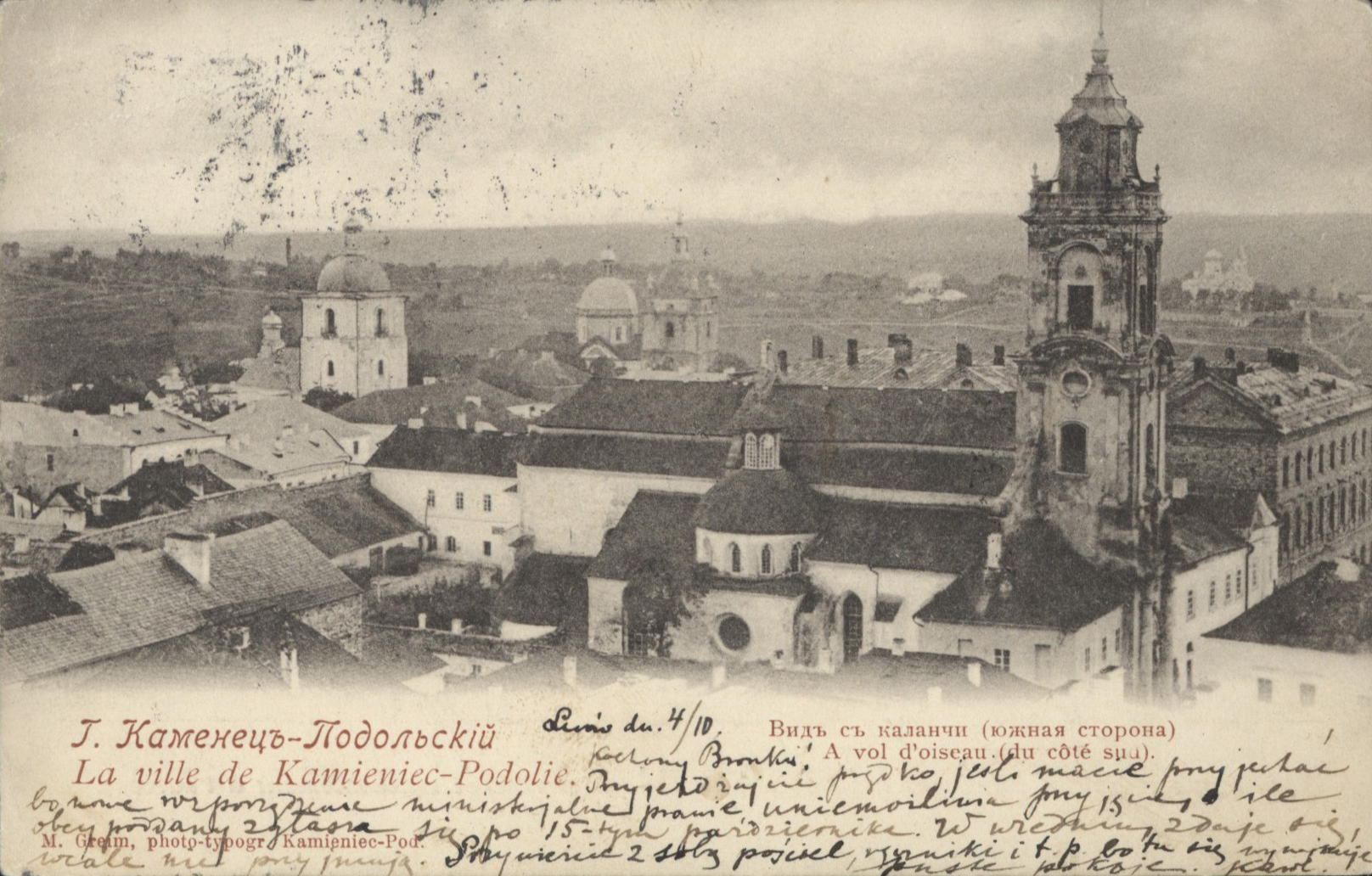 Кам'янець-Подільський. Вигляд південного боку з ратушної вежі. Поштова картка фото-типографія М. Ґрейма.